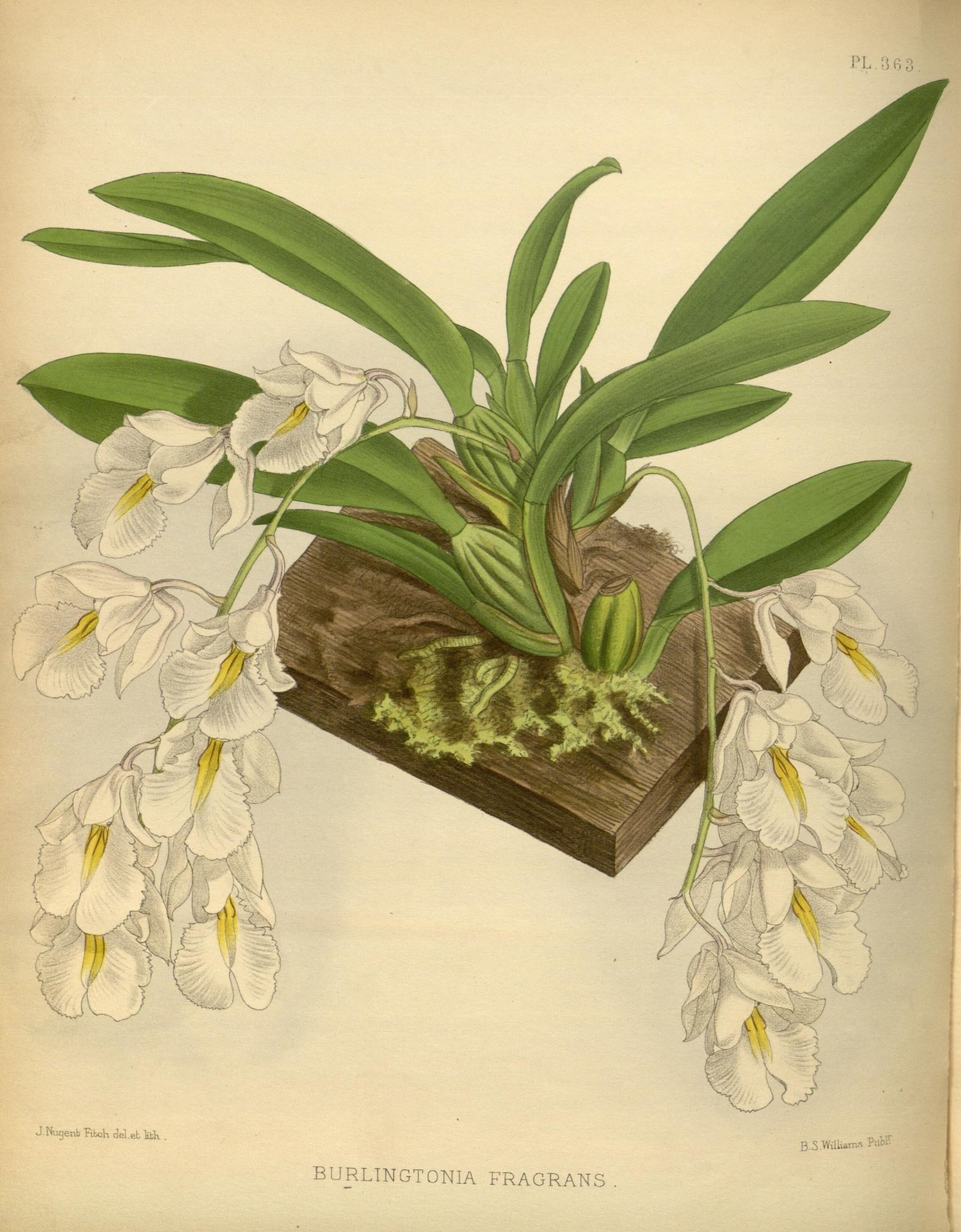 PL. 363 1 i t; J.Nugenb Tii.cK cJel.eb "kfck . B.S.WilUaiP.^^ ?u'o^- burlingto;nia fragrans